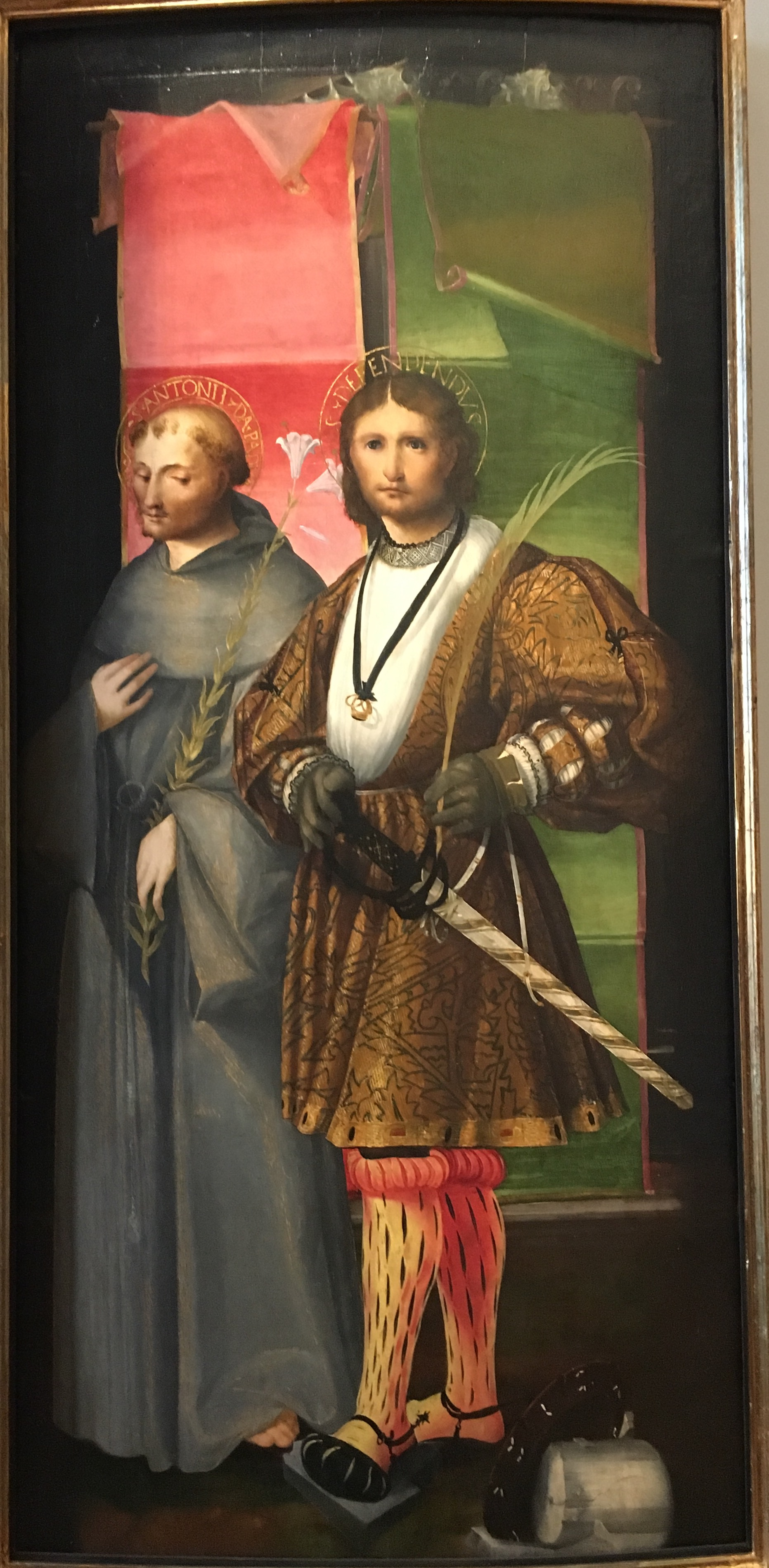 SS. Antonio da Padova e Defendente.title QS:P1476,it:"SS. Antonio da Padova e Defendente." label QS:Lit,"SS. Antonio da Padova e Defendente."